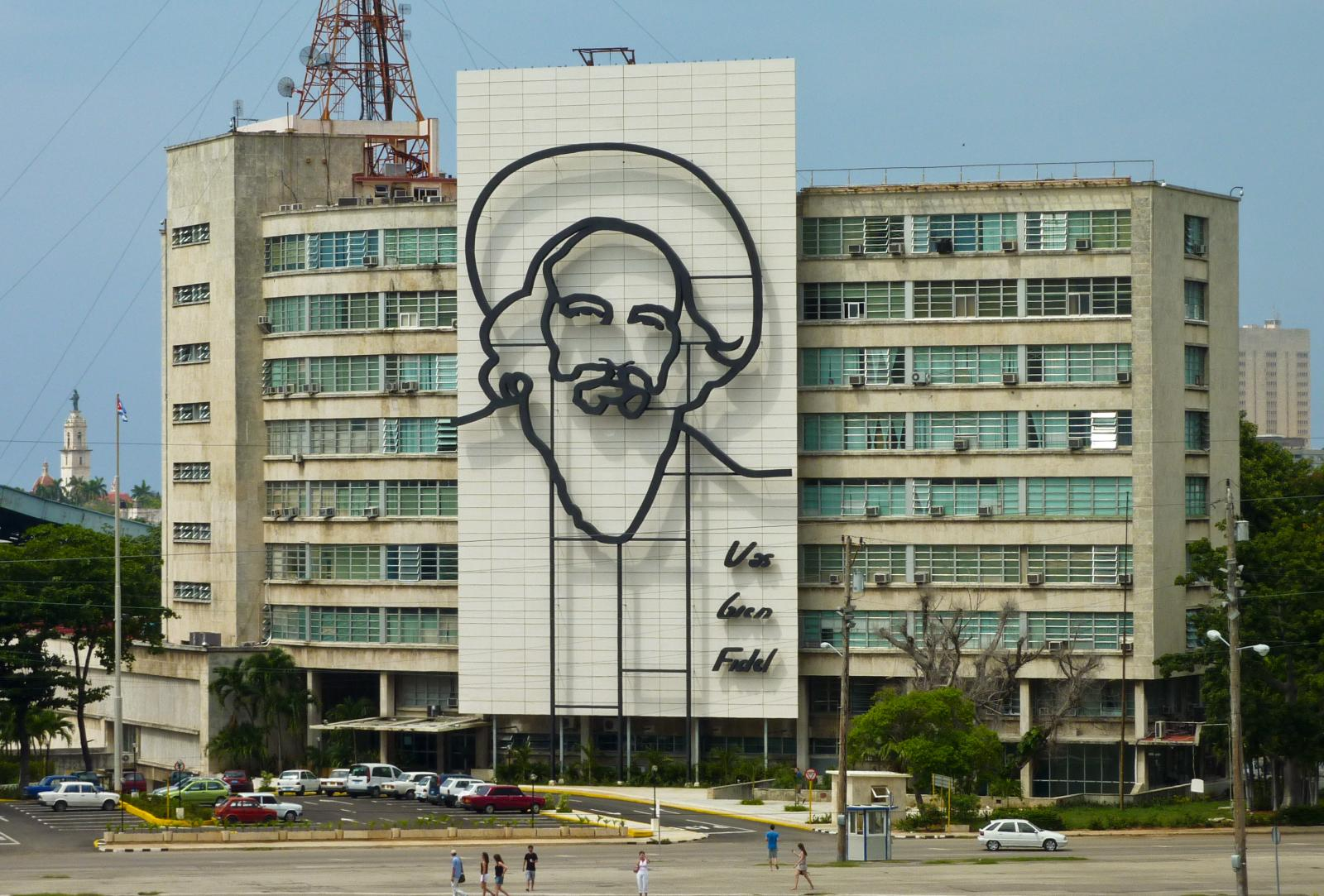 Cuando lo vi a lo lejos creí que llevaba aureola, pero luego me dijeron que era un sombrero. Emblemático revolucionario cubano y muy querido por el pueblo, Camilo Cienfuegos Gorriarán murió en 1959 en circunstancias poco claras. Su figura está emplazada sobre la fachada del Ministerio de la Informatica y las Comunicaciones (MIC) de Cuba, frente a la Plaza de la Revolución.